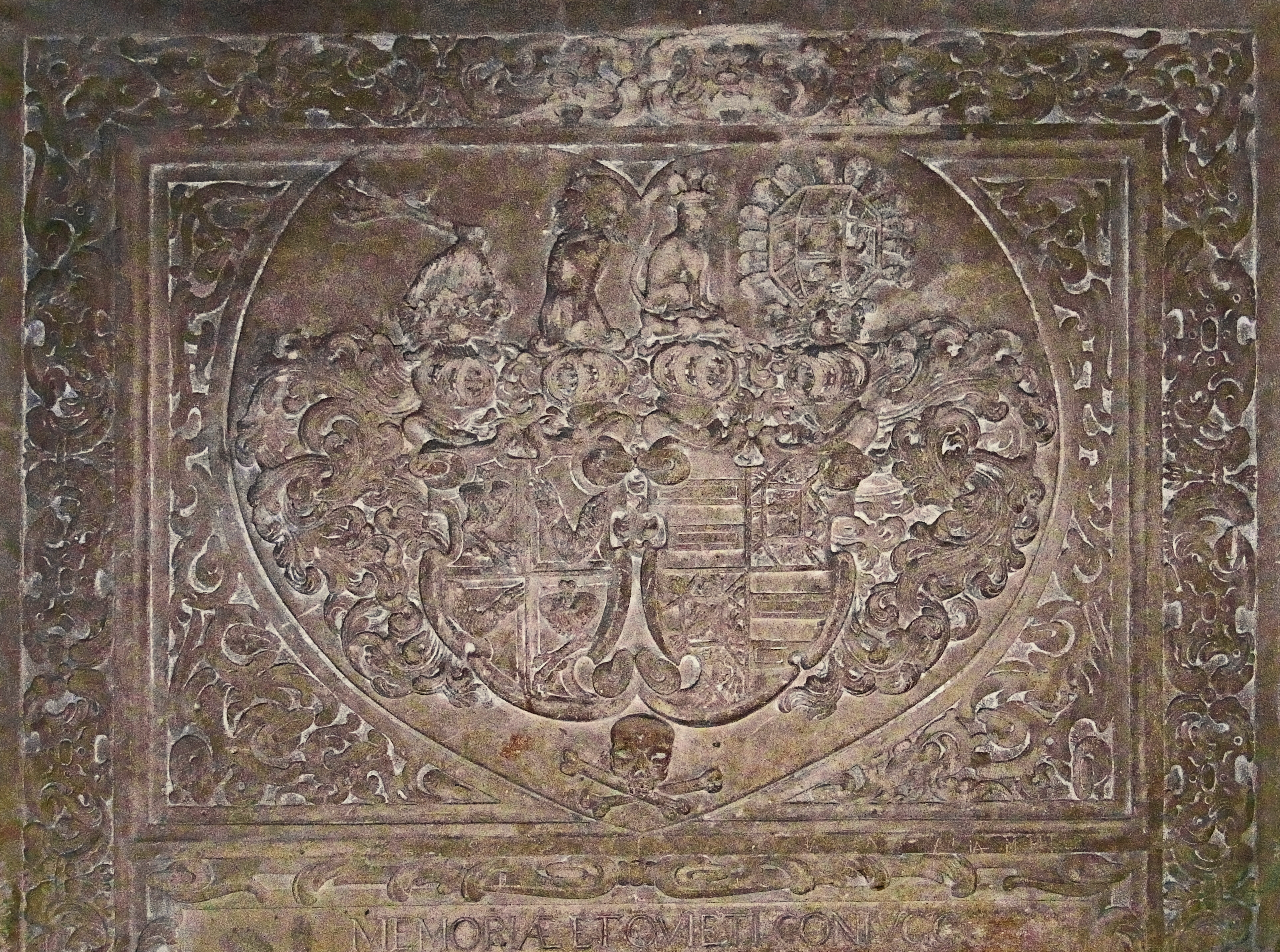 Stiftskirche St. Georg, Tübingen Hans Joachim von Grünthal (1576 - 1639) und Dorothea von Laymingen (1575 - 1629)